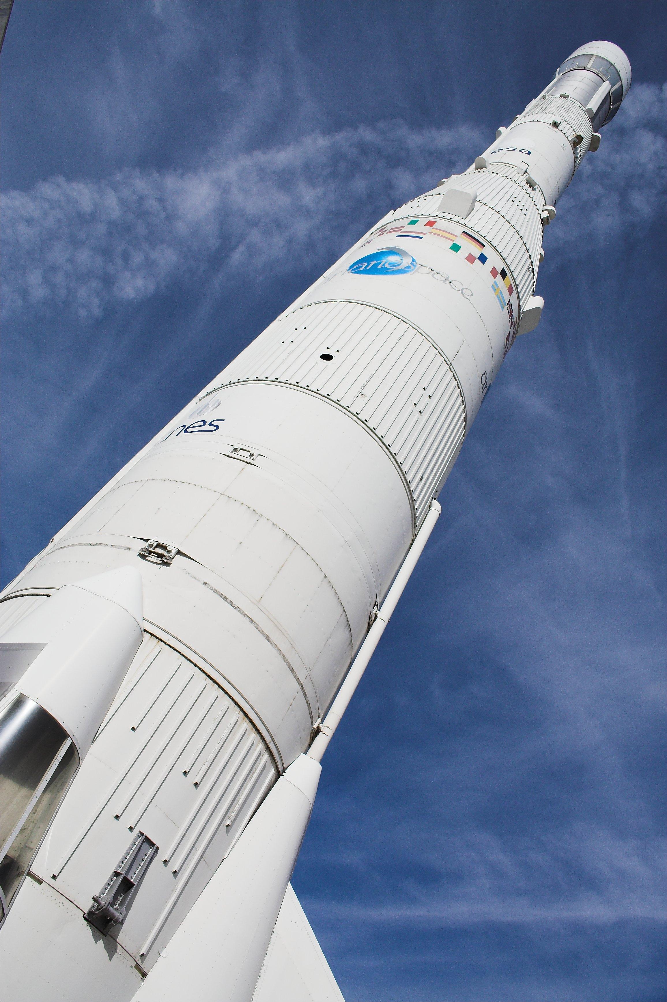 A model of an European rocket Ariane 1 in the Museum of Air and Space(Musée de l'air et de l'espace, Le Bourget, France)